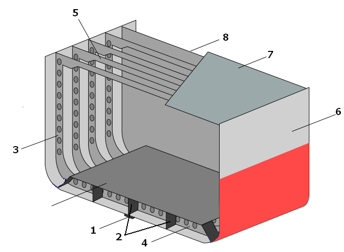 Estructura transversal del casco de un buque.